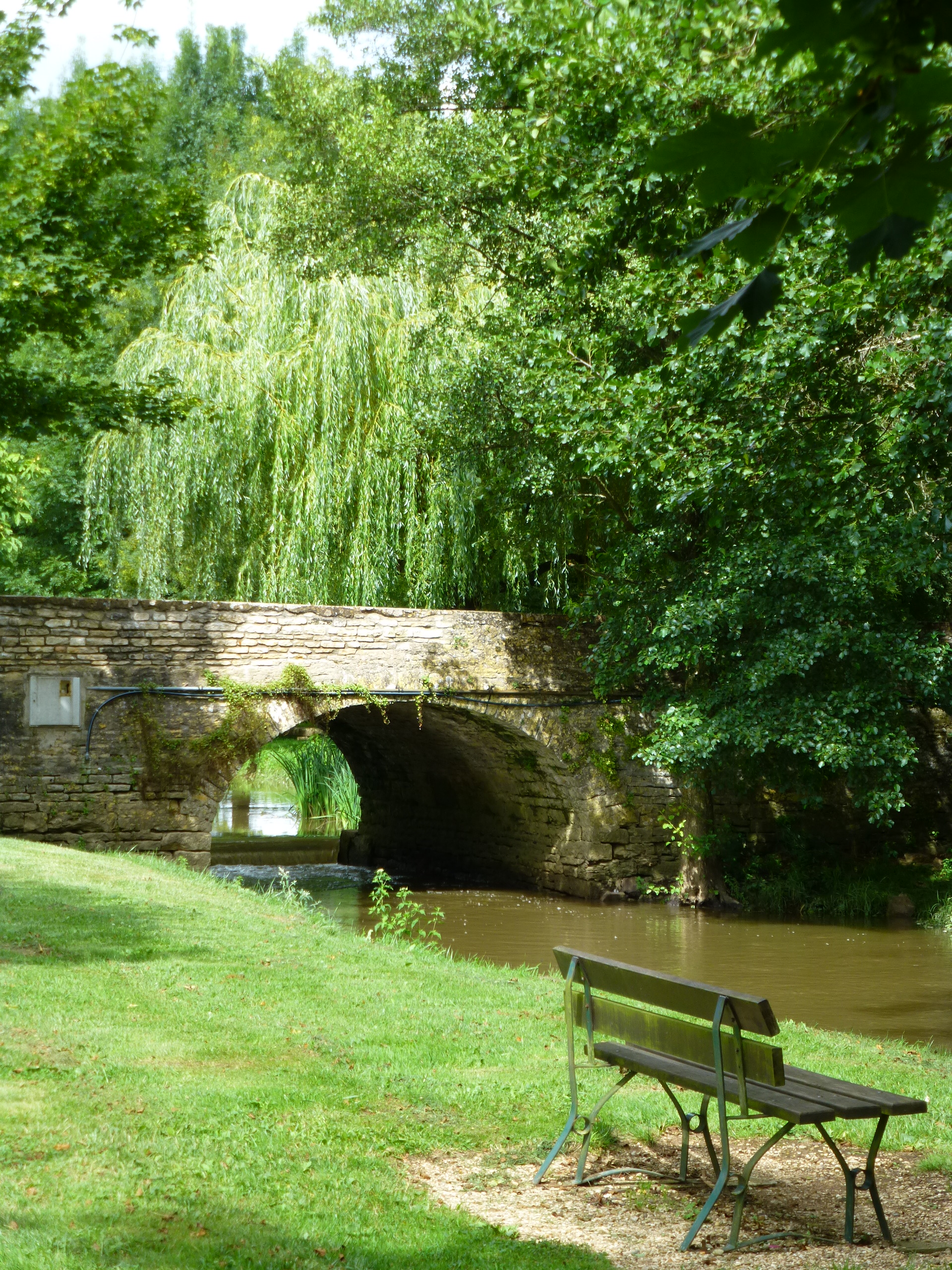 La Guye vue de l'aire de jeu à Germagny